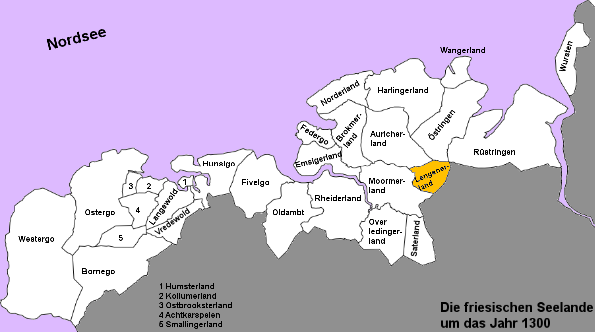 Karte der freien friesischen Seelande (Landesgemeinden) von der Zuiderzee bis zur Weser in den Grenzen um das Jahr 1300, das Lengenerland hervorgehoben. (Karte ohne Inseln.)